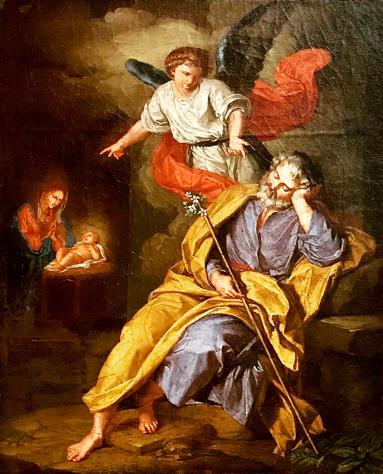 Giuseppe Bottani (Cremona 1717-Mantova 1784), Sogno di San Giuseppe. Olio su tela, 36 X 43 cm.